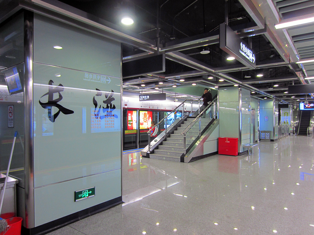 長湴站站台